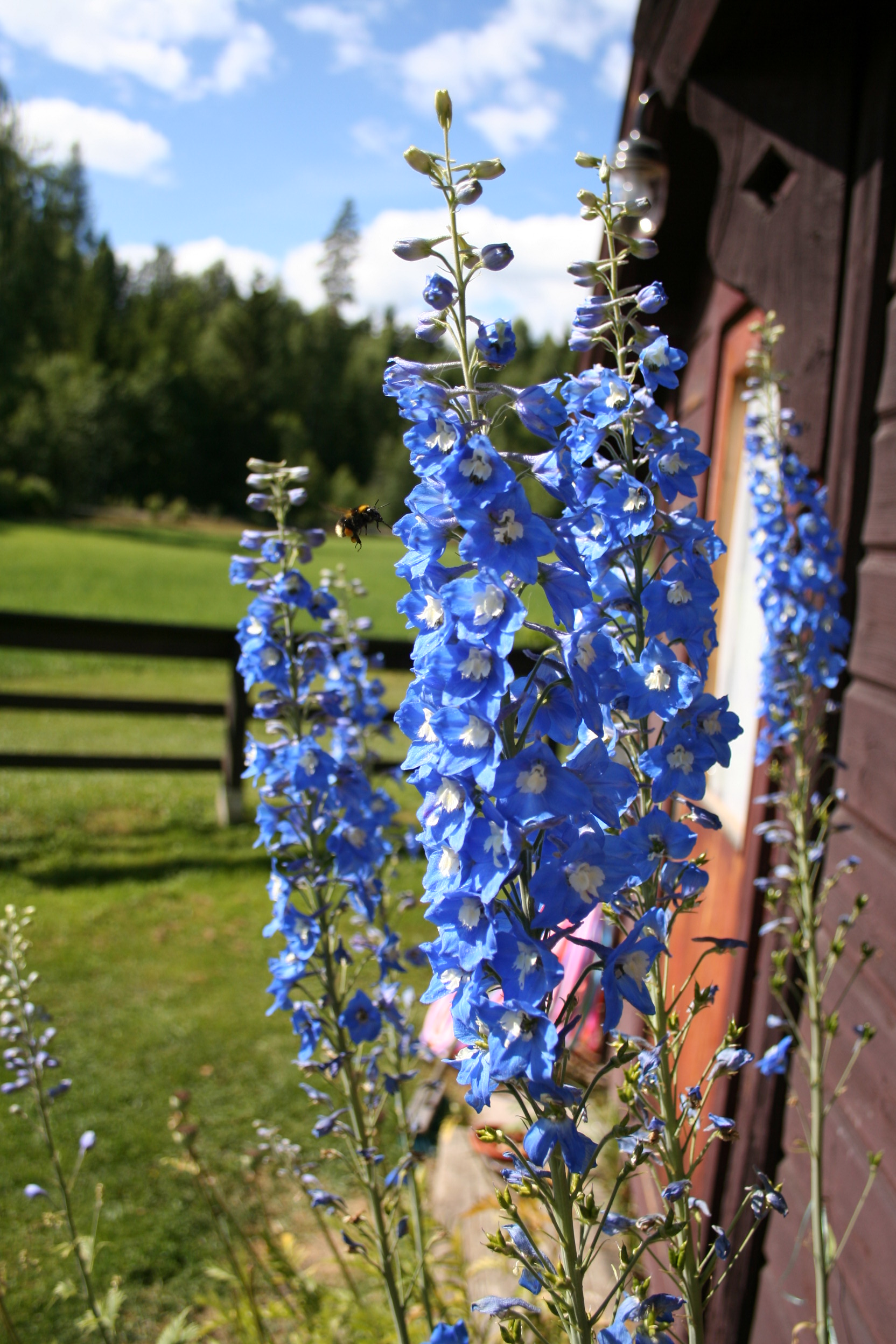 Blomster ved Nyfossum, Blaafarveværket.